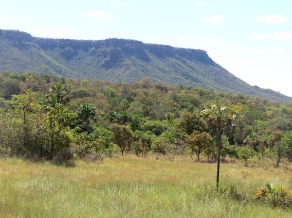 PARQUE NACIONAL DA NASCENTE DO RIO PARNAIBA